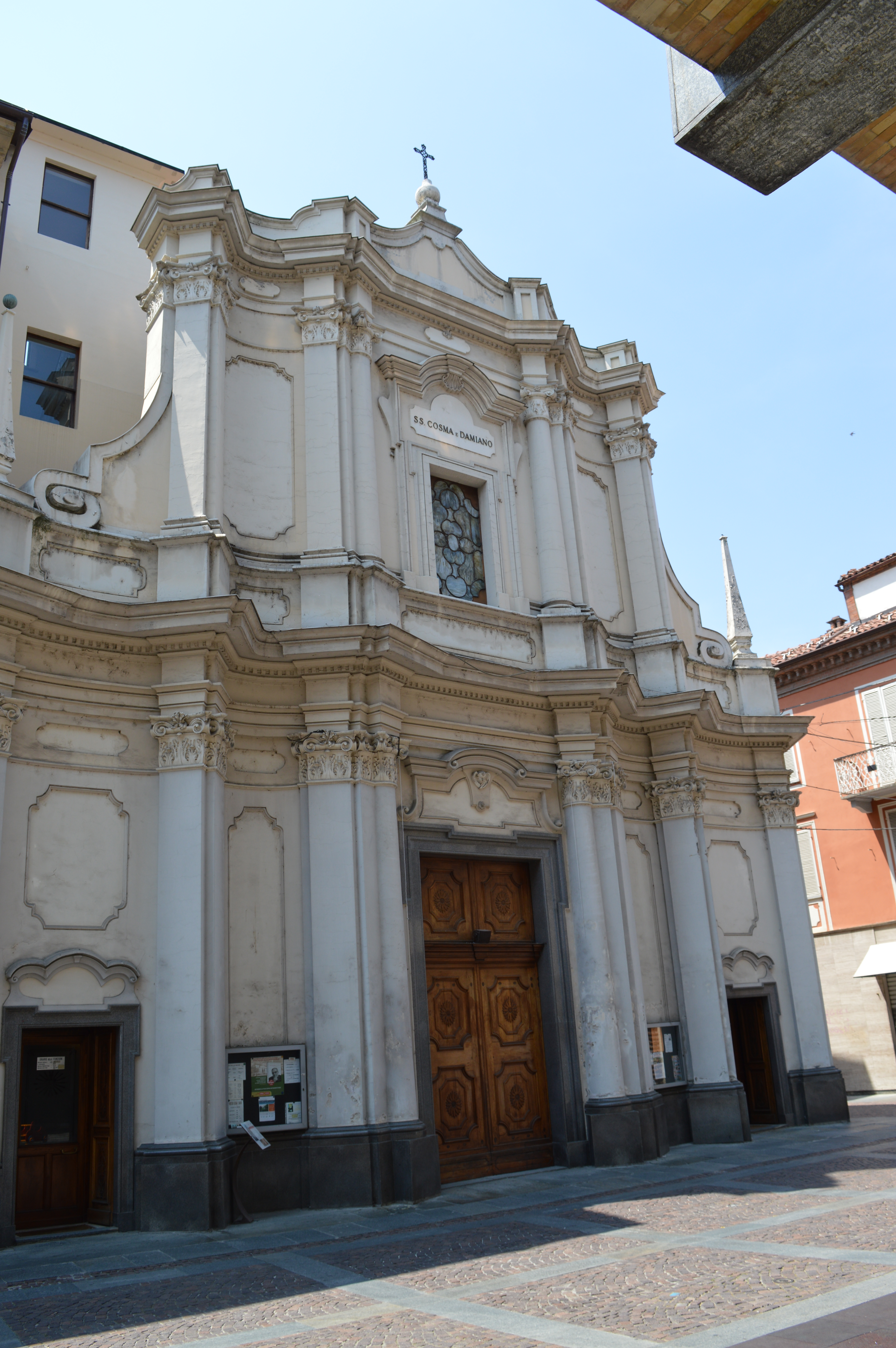 Facciata della chiesa dei Santi Cosma e Damiano ad Alba.